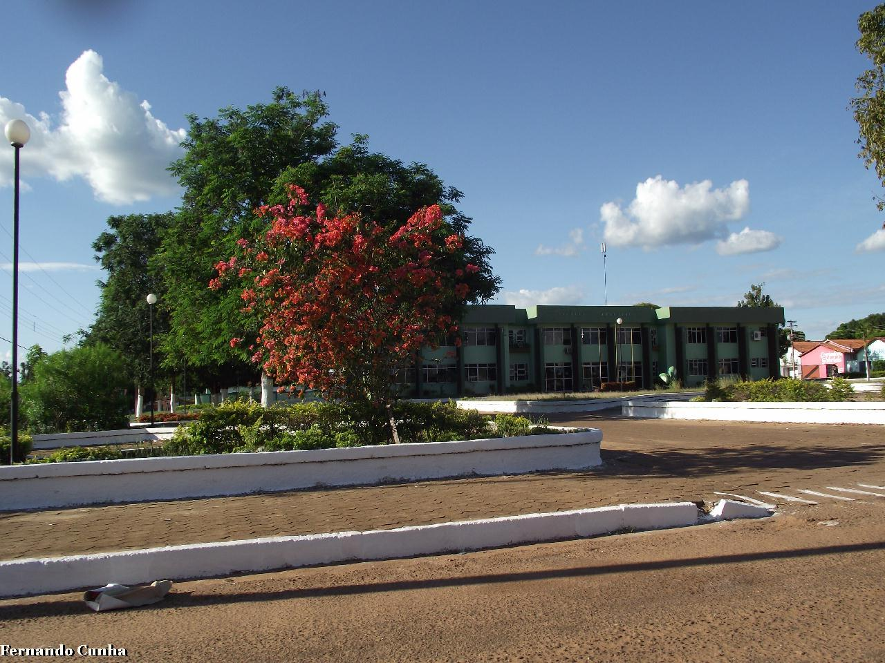 Prefeitura Municipal de Araguatins.